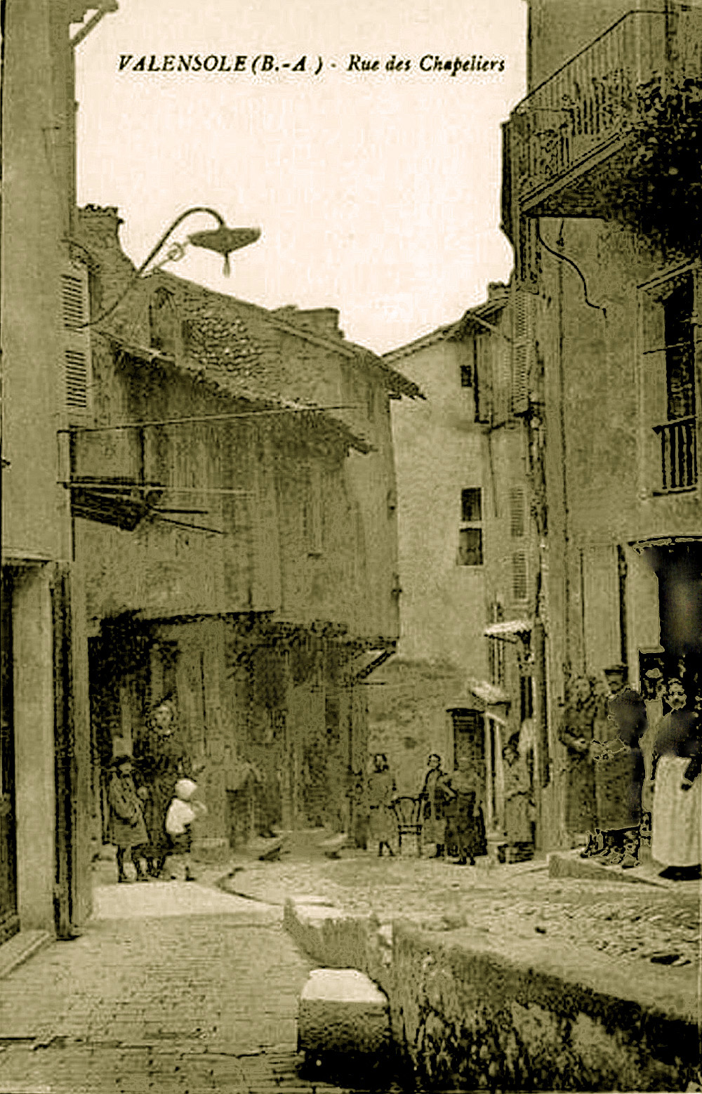 Maisons à encorbellement à Valensole